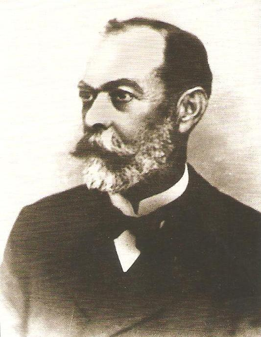 Pere Renom i Riera (1850-1911) polític i escriptor. Alcalde de Badalona entre 1893-94 i 1898-99.